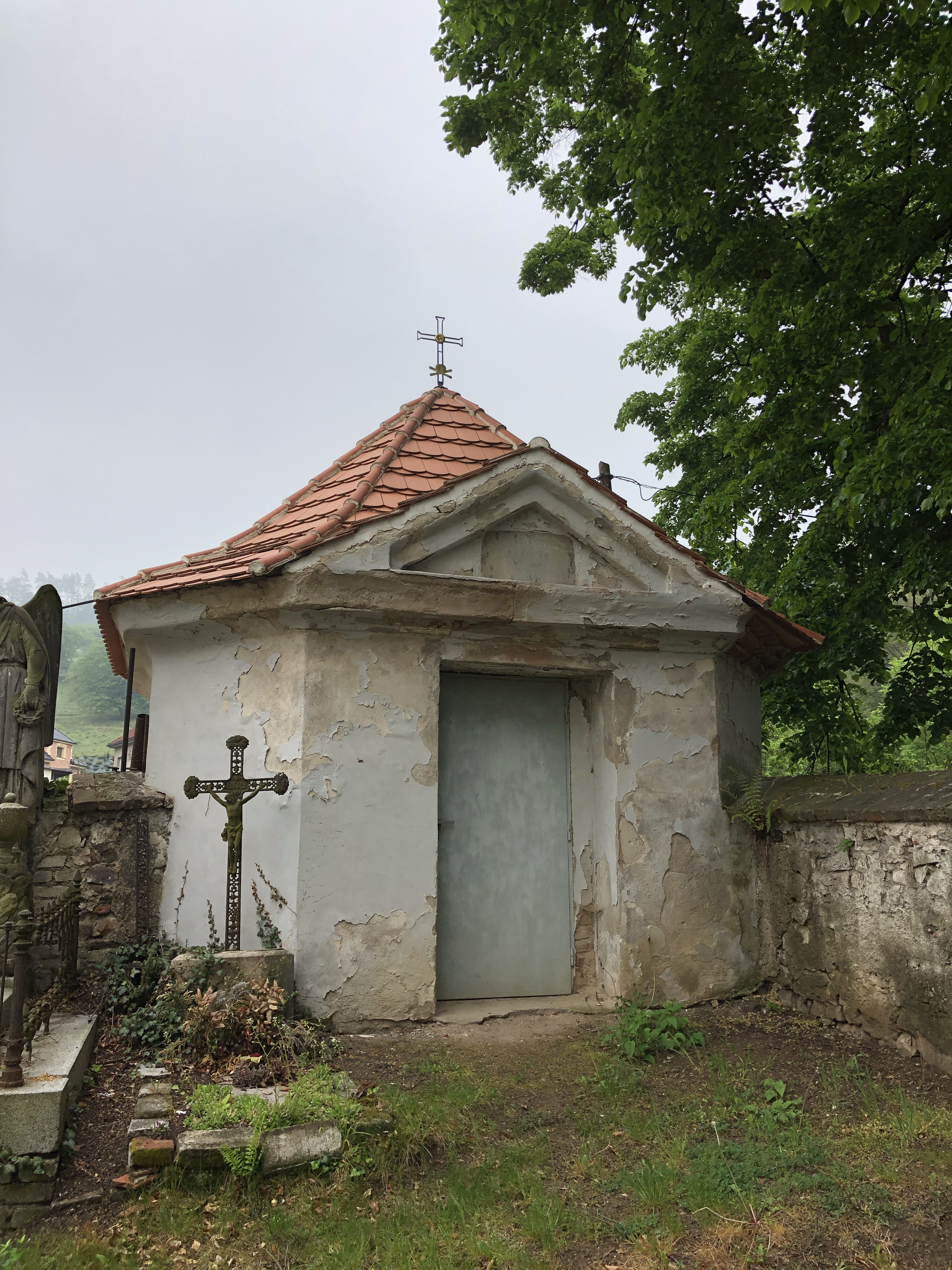 Empírová hrobka Kirstenů v areálu kostelního hřbitova sv. Václava ve Všenorech